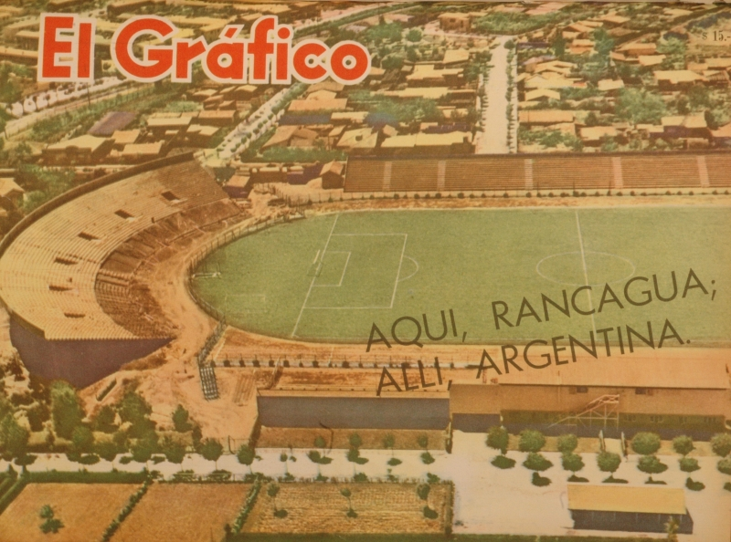 Estadio Rancagua (Chile). 30 de Mayo de 1962